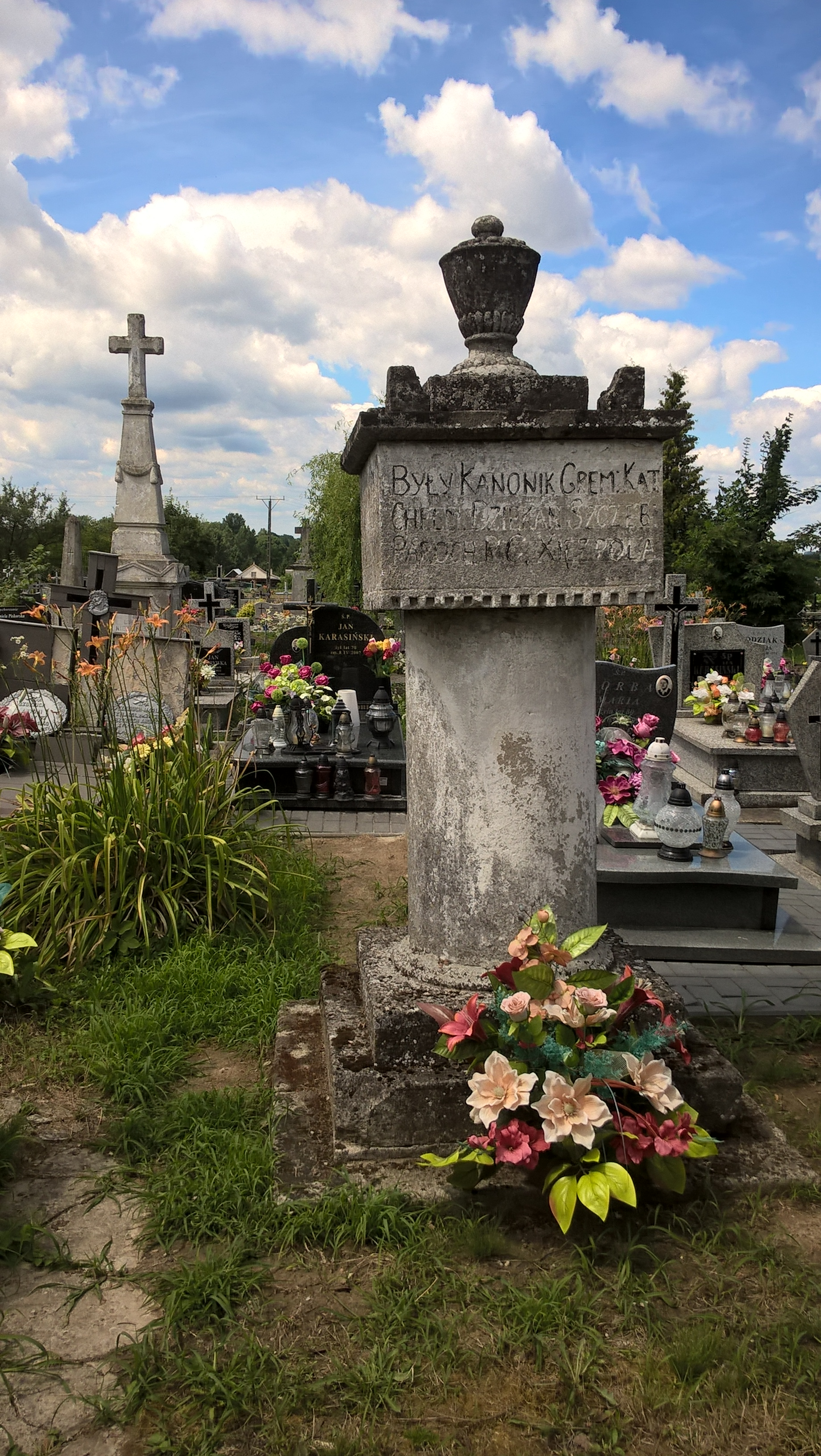 Cmentarz katolicki w Księżpolu, nagrobek kanonika Jana Teraszkiewicza